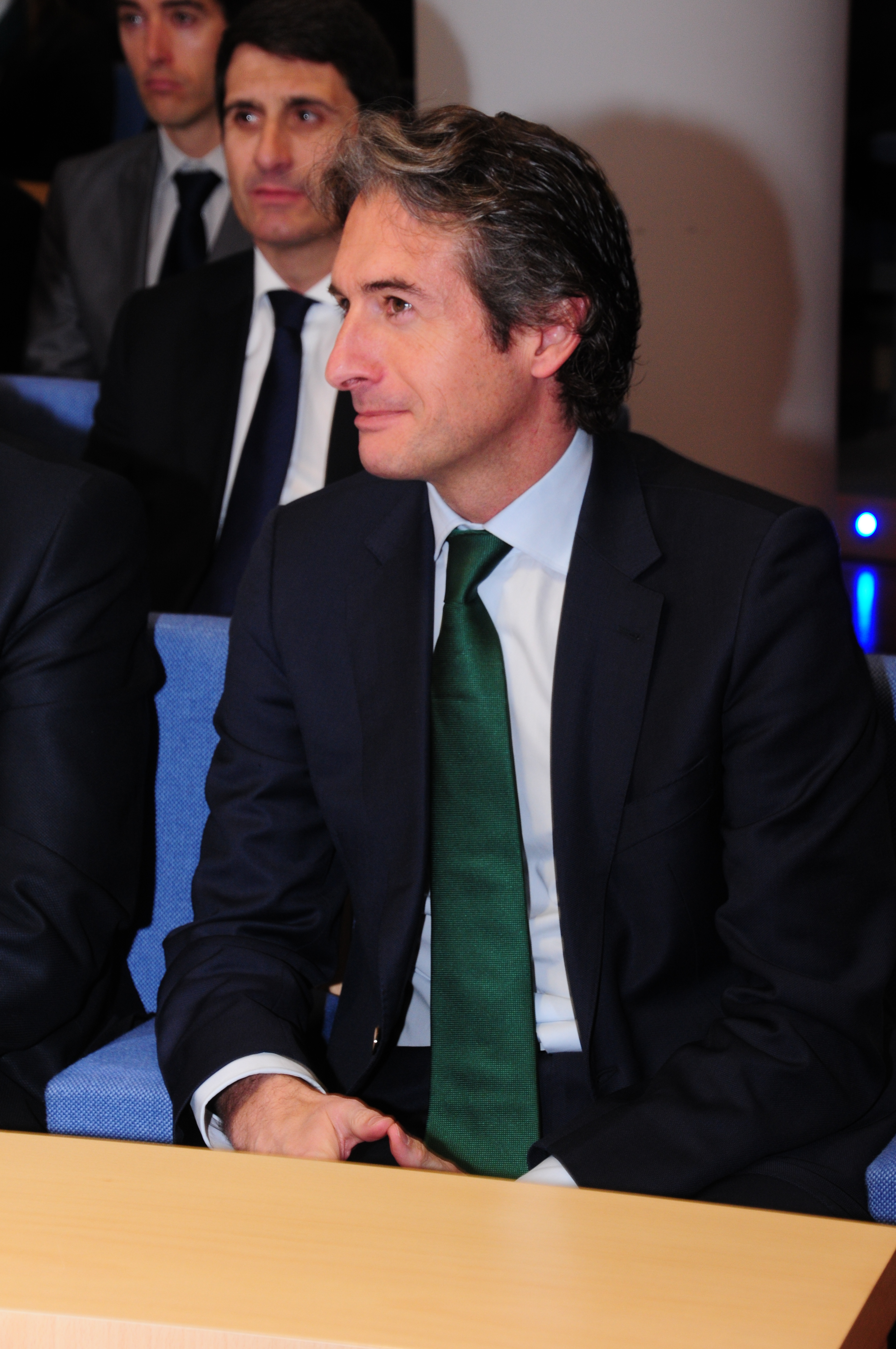 Día de la UNED 2013, 21 de marzo